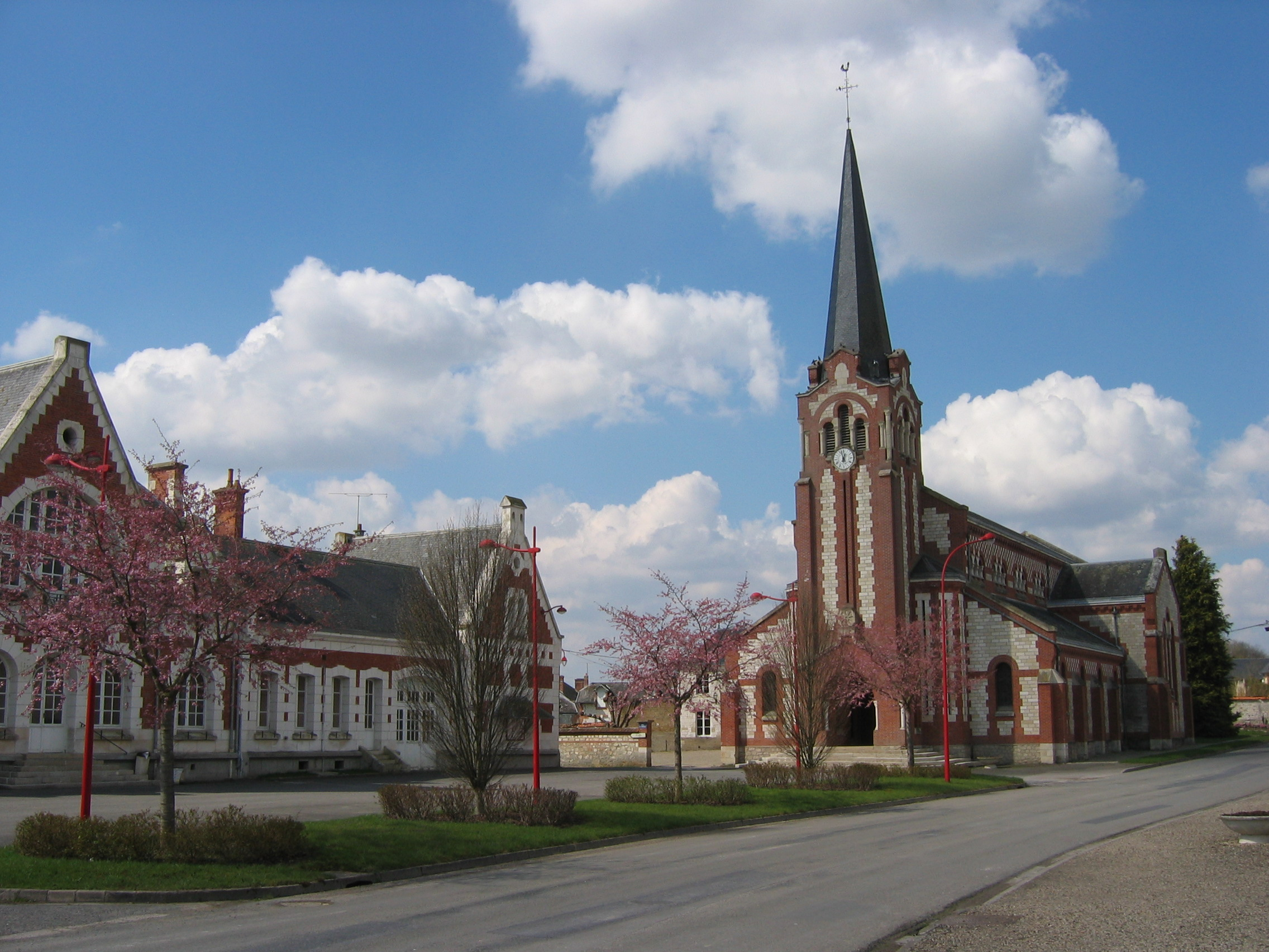 avril 2015 vue de l'église du Thour, Ardennes, France